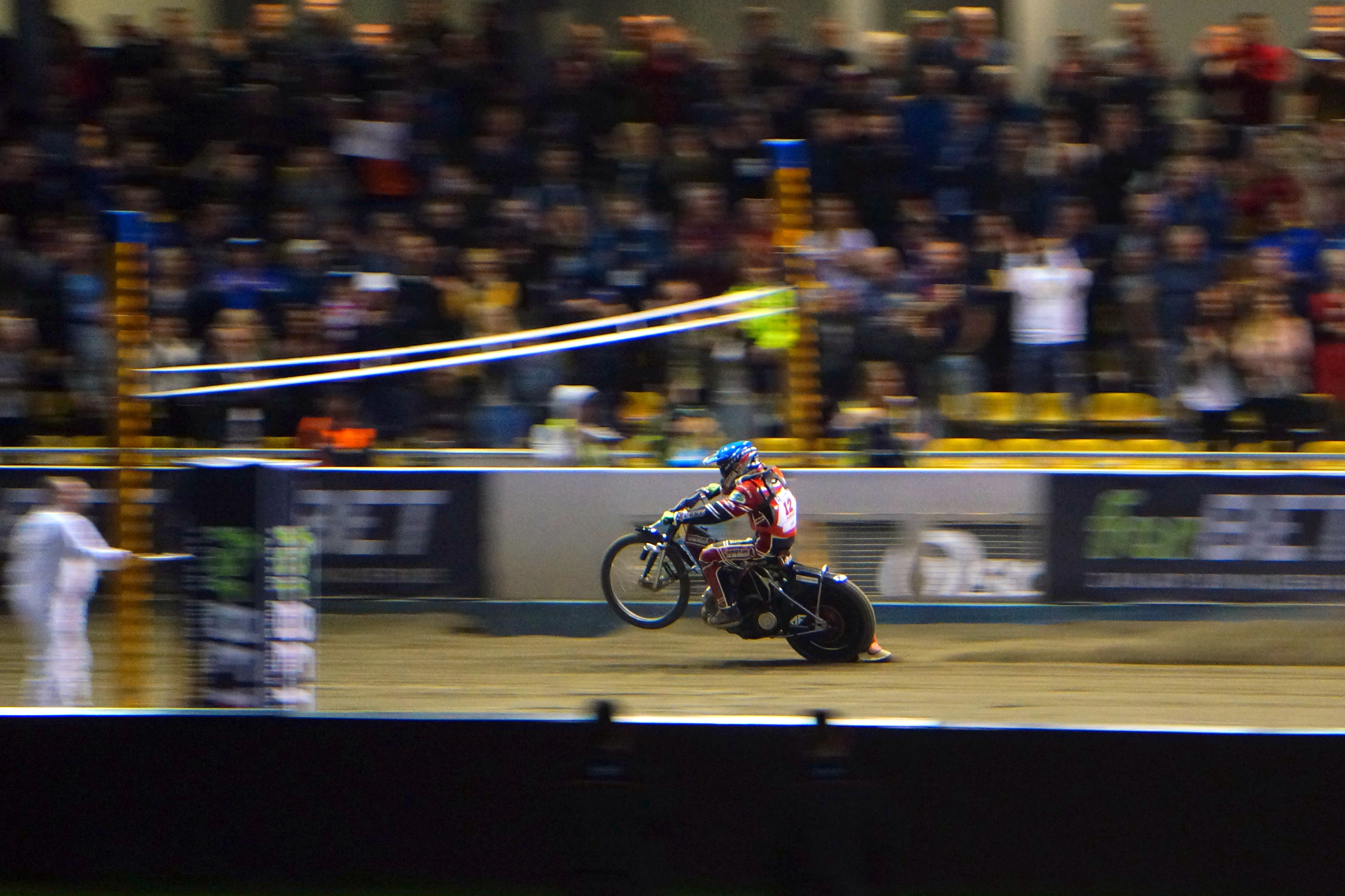 Gorzów Wlkp. Indywidualne Mistrzostwa Polski na Żużlu 2017. Finał, bieg 22, wygrywa Szymon Woźniak zostając Mistrzem Polski na żużlu w 2017 r. Drugi minie linię mety Przemysław Pawlicki a trzeci, Patry Dudek